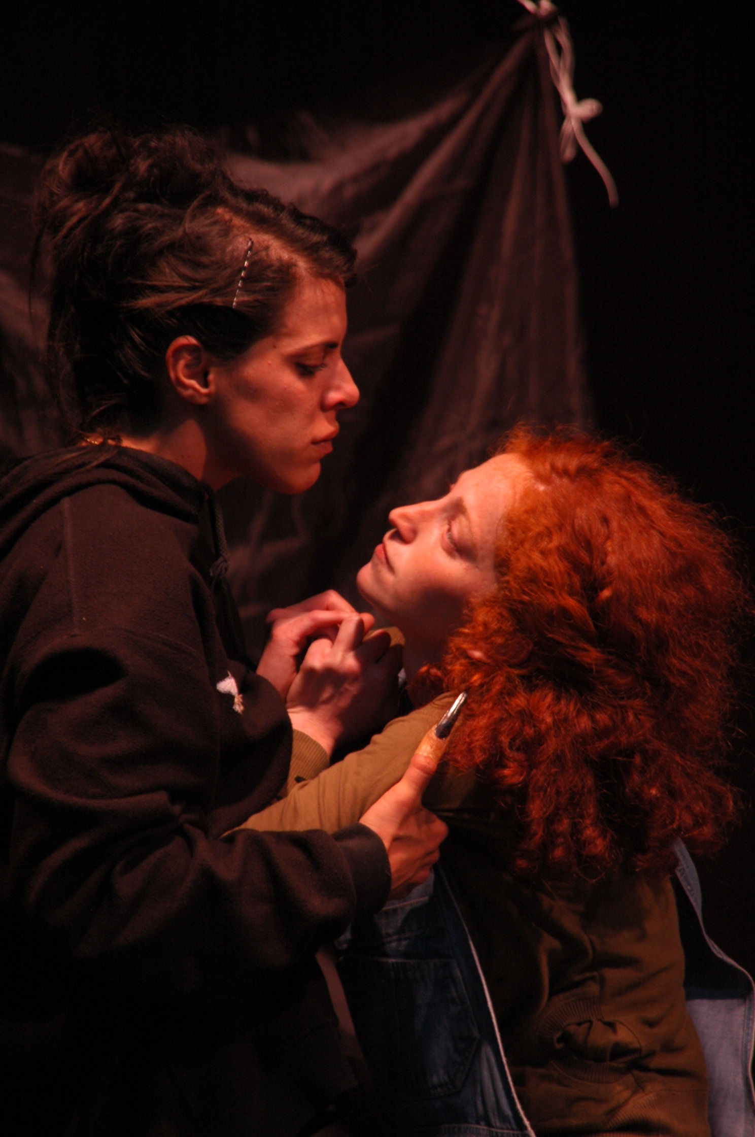 הילדה שהיא בעצם מריצה מאת עודד ליפשיץ בבימויה של עדנה שביט